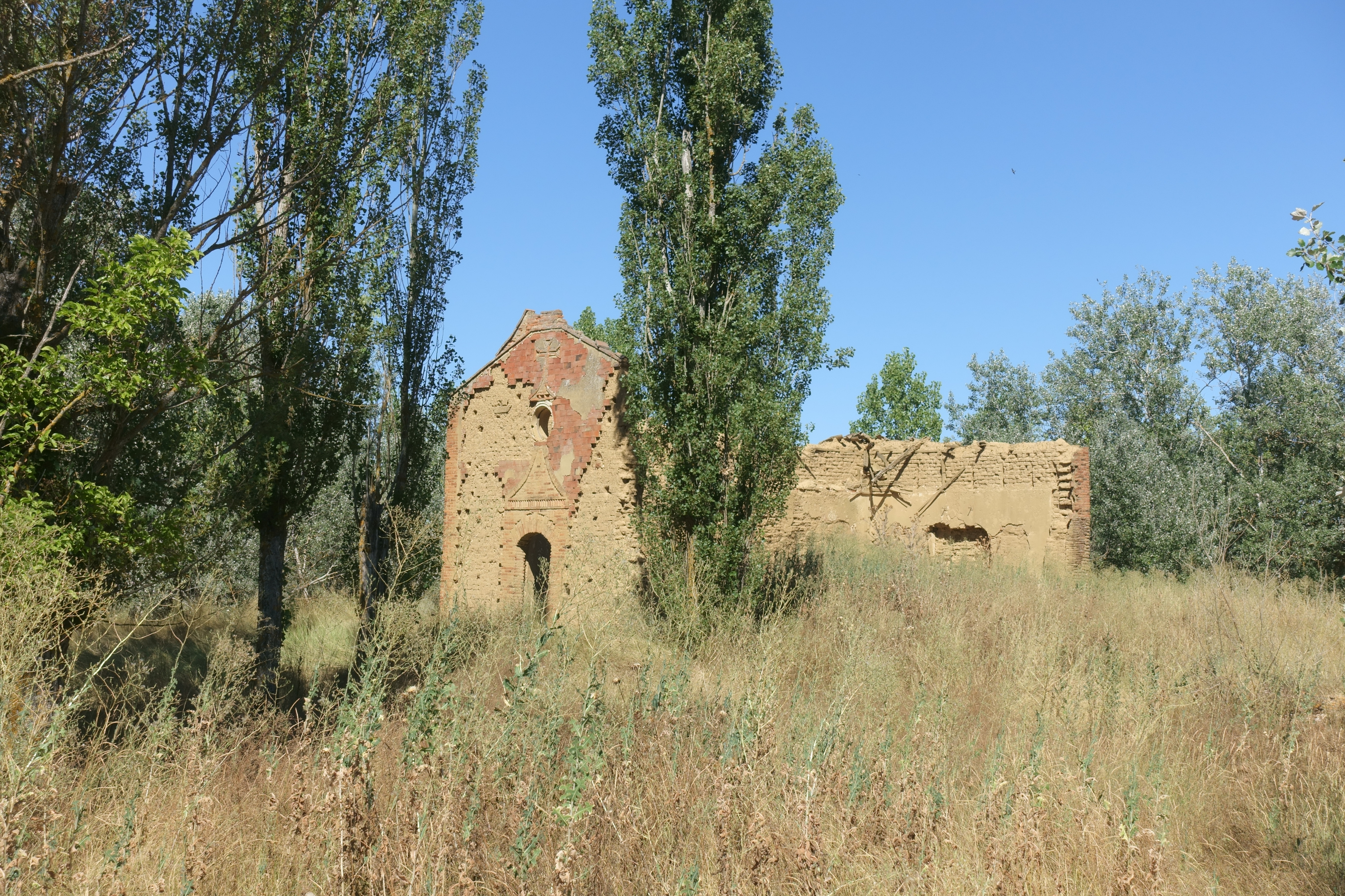 Ruinas de la ermita del Cristo de la Misericordia, en Santervás de Campos (Valladolid, España).